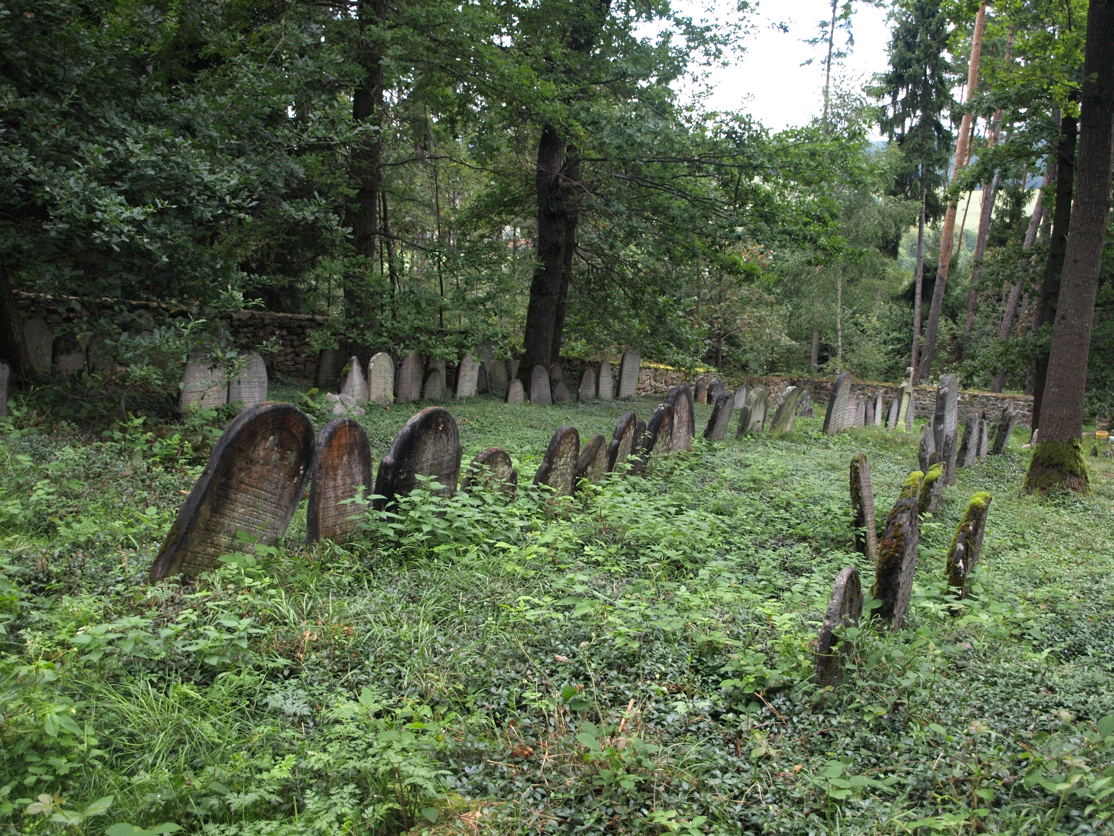 Židovský hřbitov (Dub), J od obce v lese, Dub